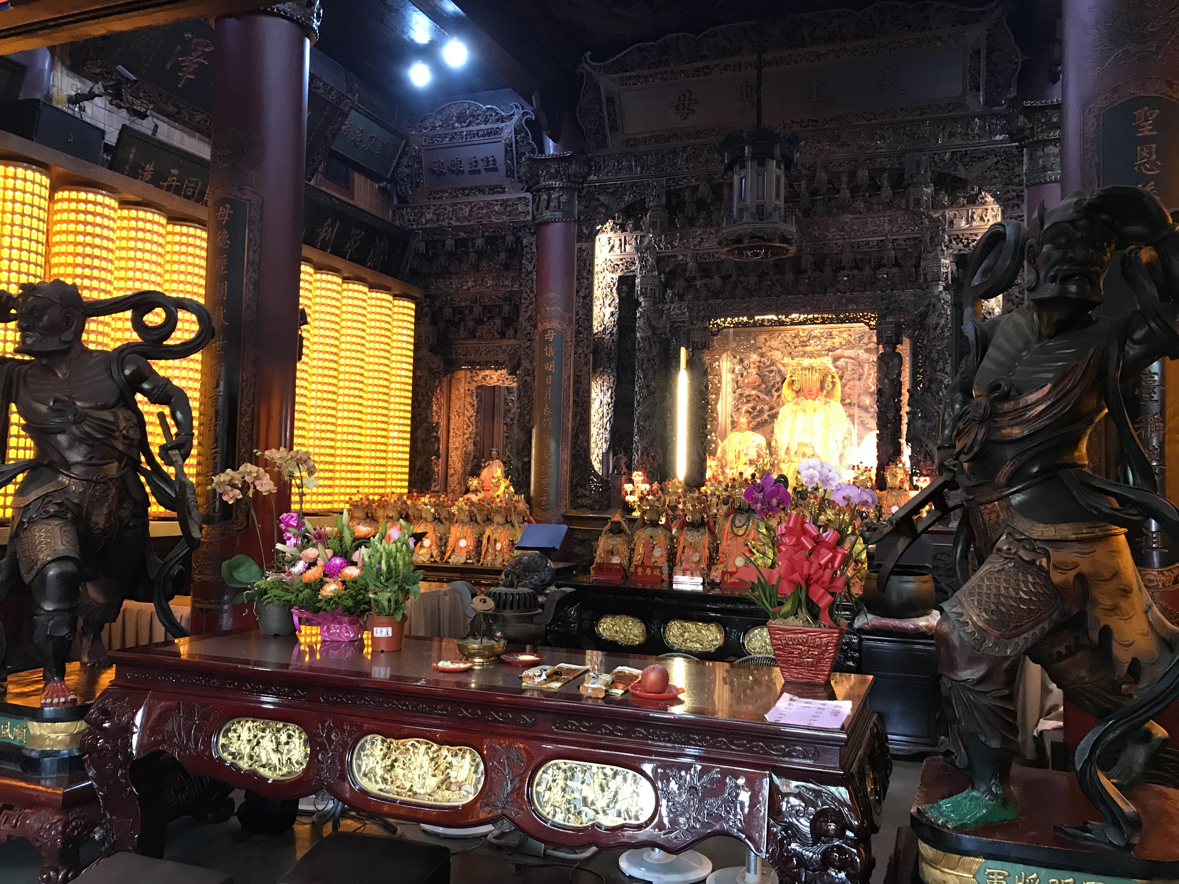 中文（台灣）: 桃園慈護宮內部